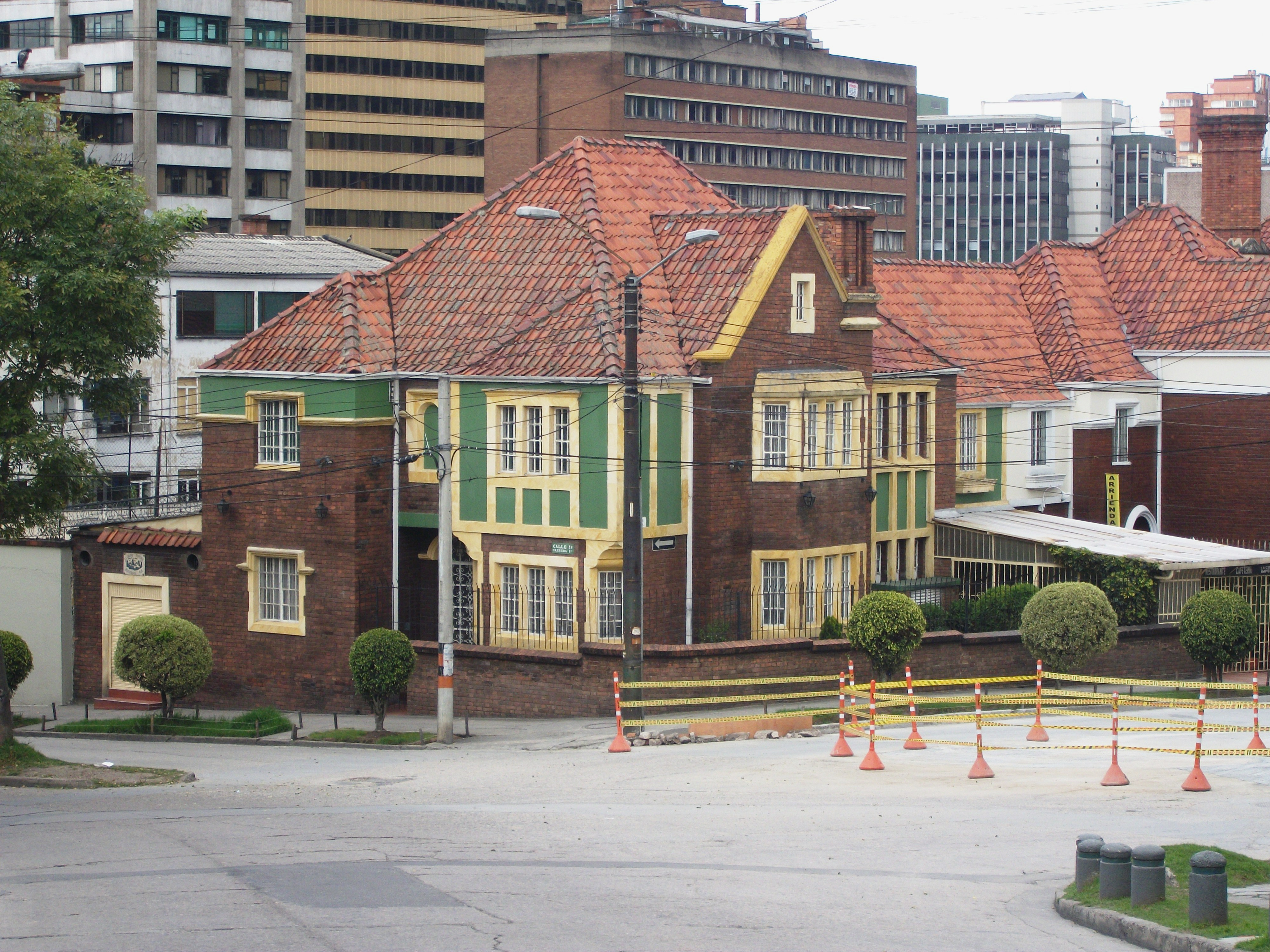 Casa en el barrio La Merced, localidad de Santa Fe en Bogotá. Diagonal 34 con cra 6.